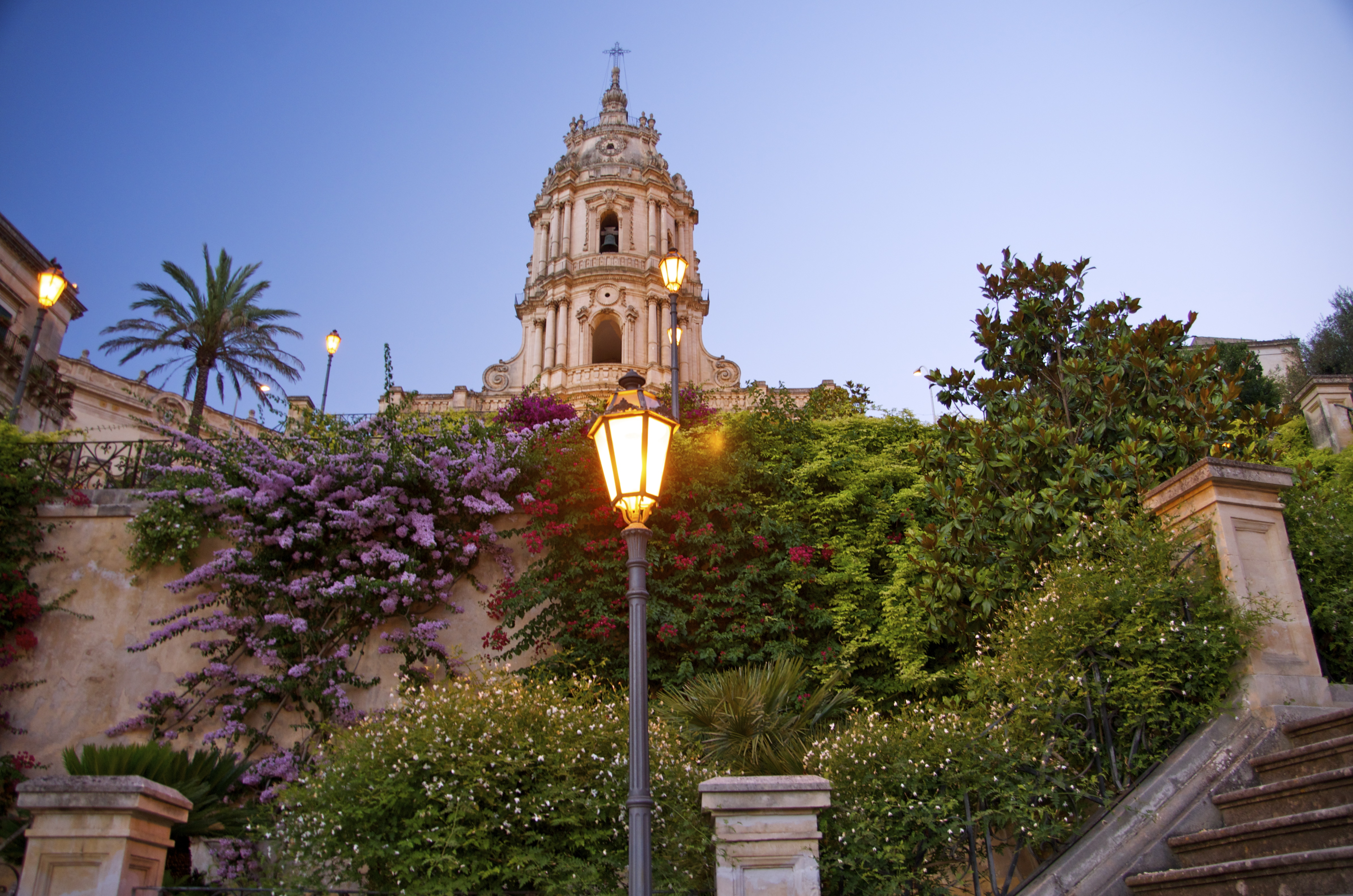 Flora iblea, Modica